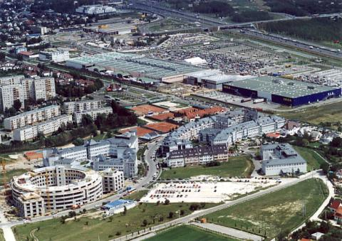 Budaörs- Hungary